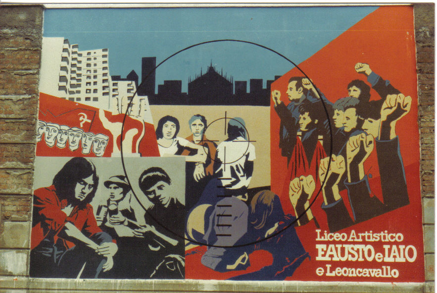 Murales in ricordo di Fausto Tinelli e Iaio Iannucci